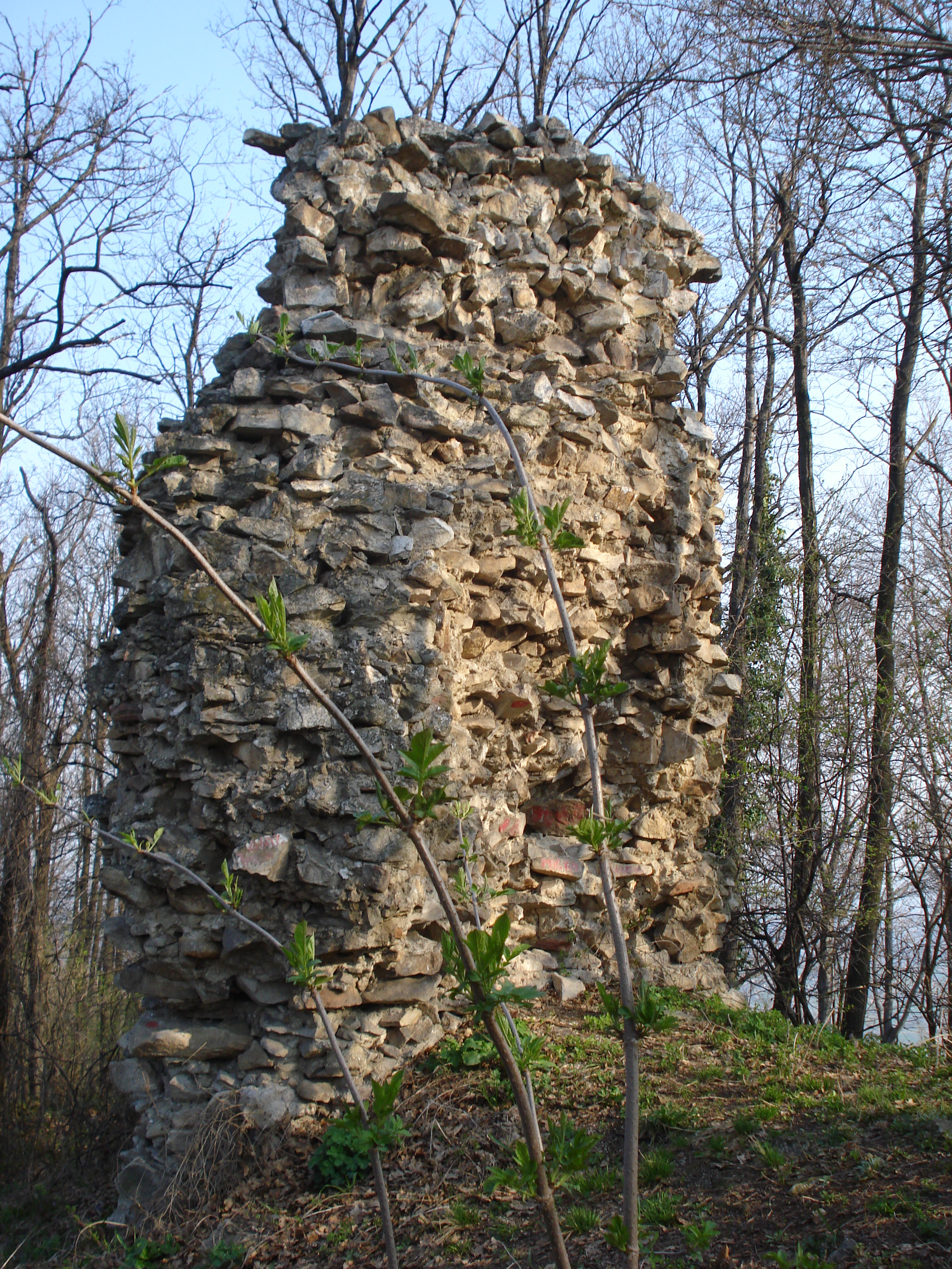 Trojanov Grad - Ostaci rimskog utvrđenja iz trećeg veka nove ere, autor Saša Dragojevic